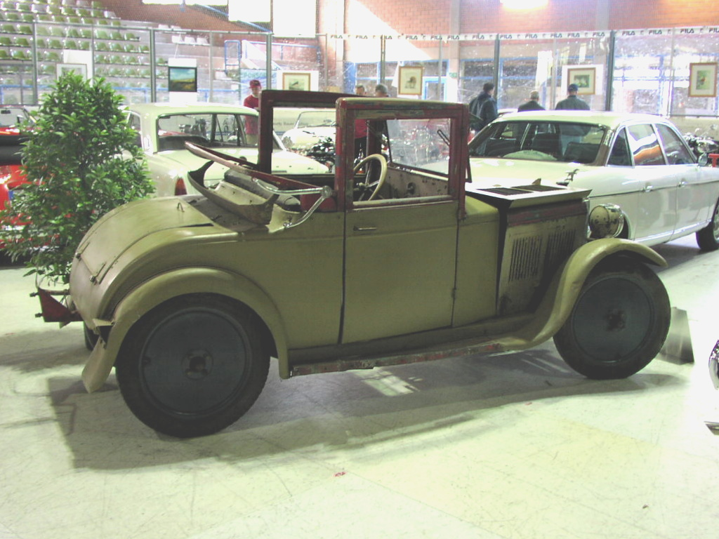 Hanomag 3/16 hp